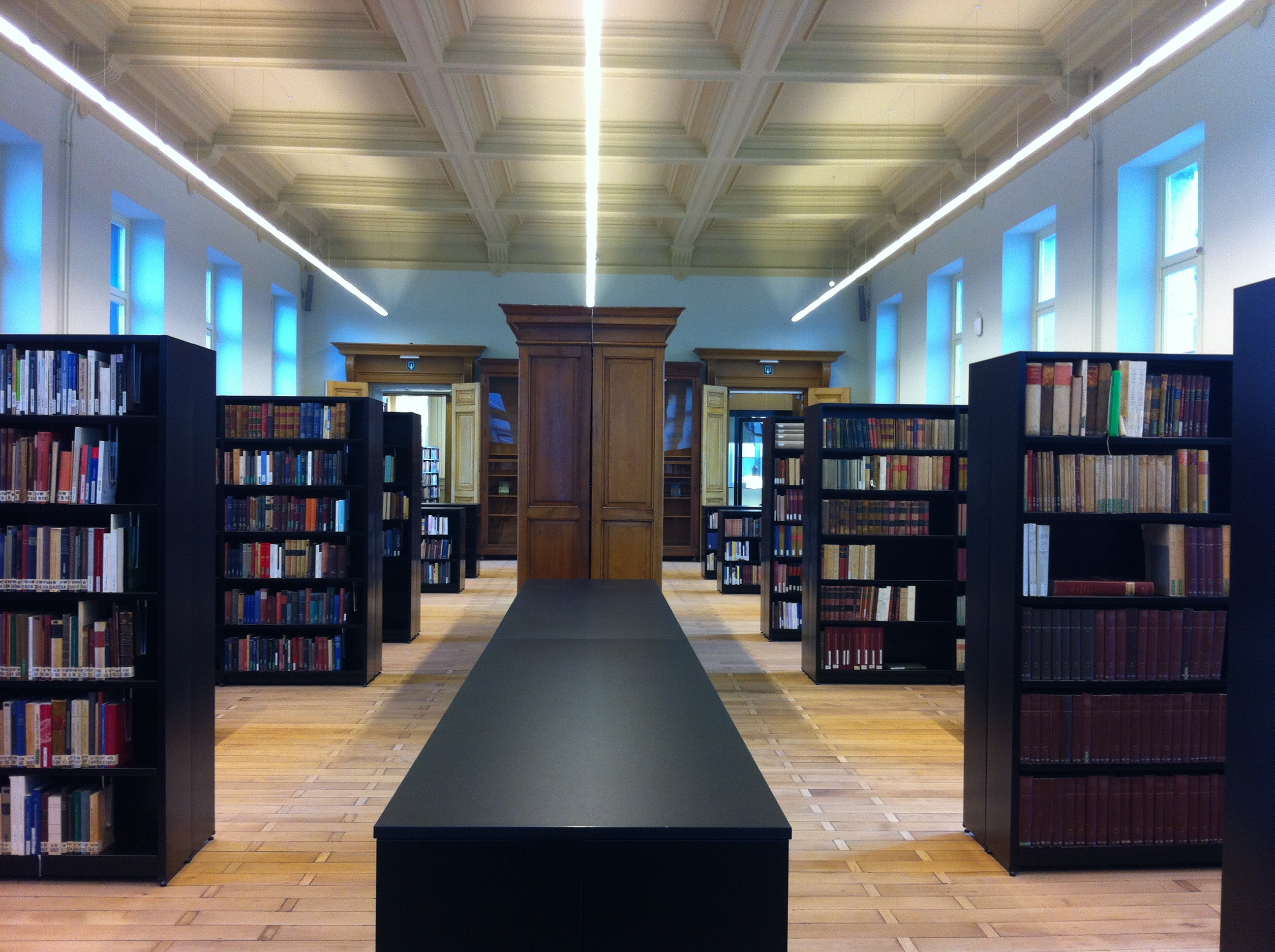 Faculty Library Arts & Philosophy Ghent University